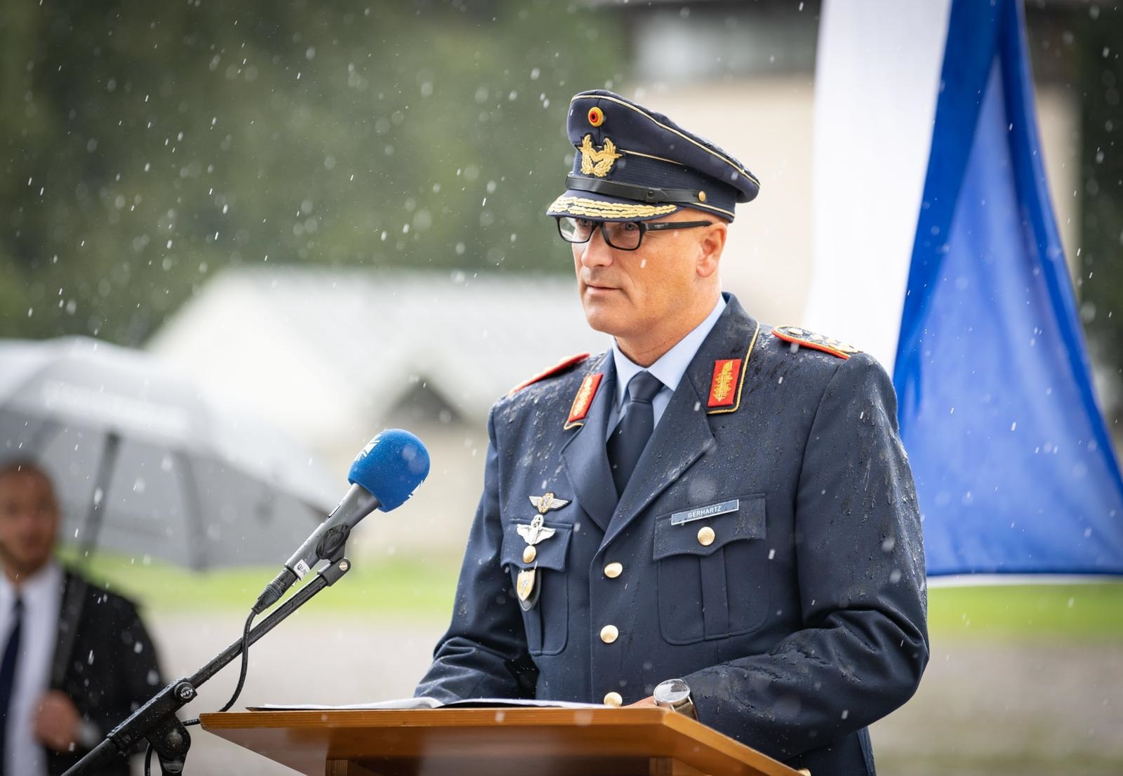 היום (שלישי), התקיים כחלק מתרגיל חיל האוויר בגרמניה, מטס "זיכרון לעתיד" - מטס הצדעה משותף בהובלת מפקד חיל האוויר, אלוף עמיקם נורקין, בליווי מפקדת טייסת הטיסה הראשונה בחיל-האוויר הישראלי, מפקדת טייסת "הנחשון", סגן-אלוף ג', ולצד מפקד חיל האוויר הגרמני, לוטננט גנרל אינגו גרהארץ. בהמשך היום נערך טקס קרקעי במחנה הריכוז "דכאו" בהשתתפות שרת ההגנה הגרמנית, גברת אנגרט קראמפ-קארנבאואר, שגריר ישראל בגרמניה, מר ג'רמי יששכרוף, מפקדי חילות-האוויר ונציגים נוספים.